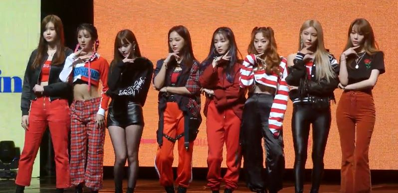 6일 오후 서울시 광진구 광장동 예스24 라이브홀에서 극단돌 '구구단'의 세번째 미니앨범 'Act.5 New Action'의 쇼케이스 행사가 진행됐다.